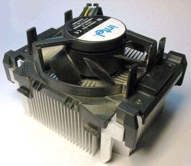 Компьютерный кулер. Фиксирующая скоба снята